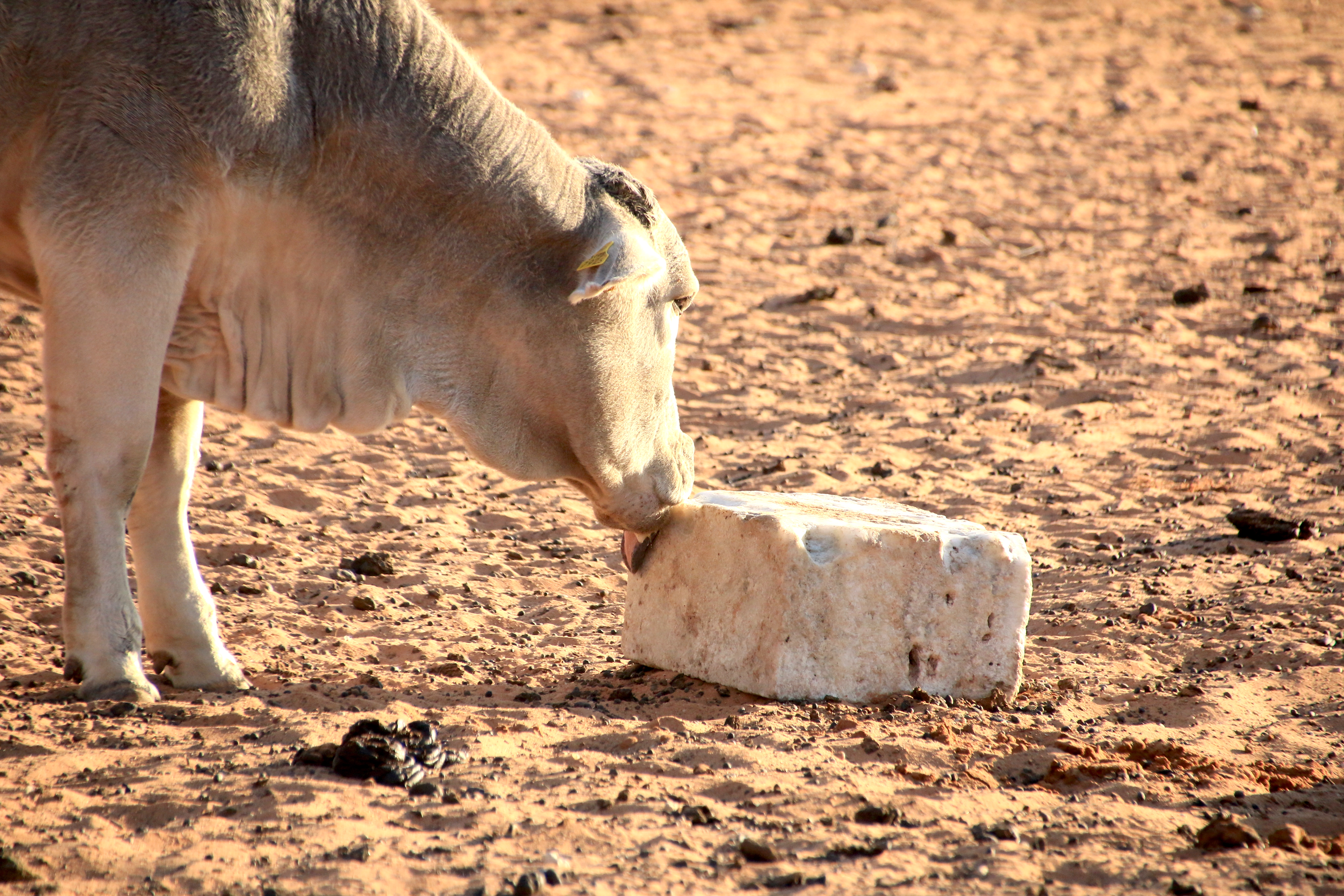 Salzleck